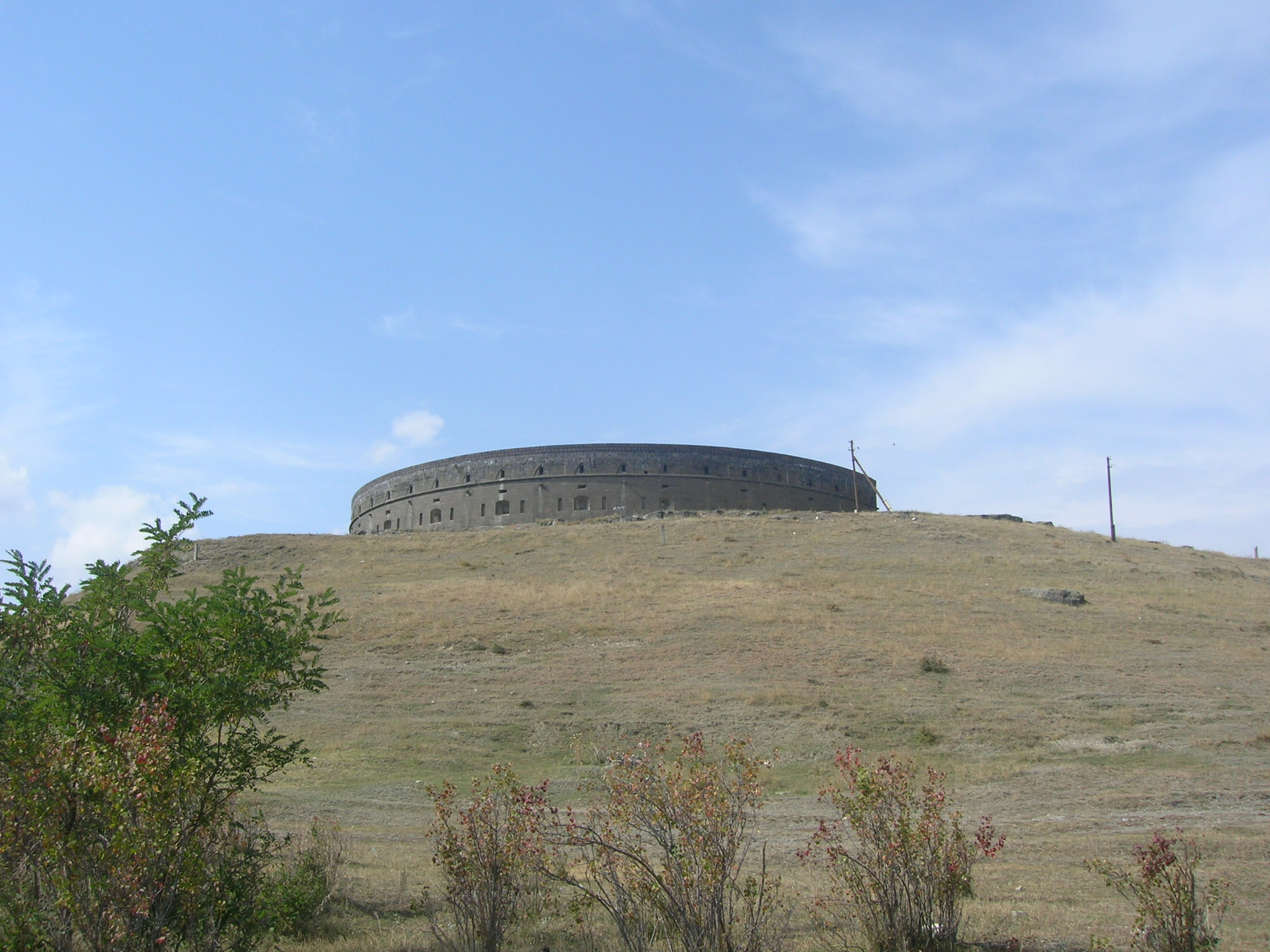 Gyumri, Armenia, el fuerte ruso 1/2